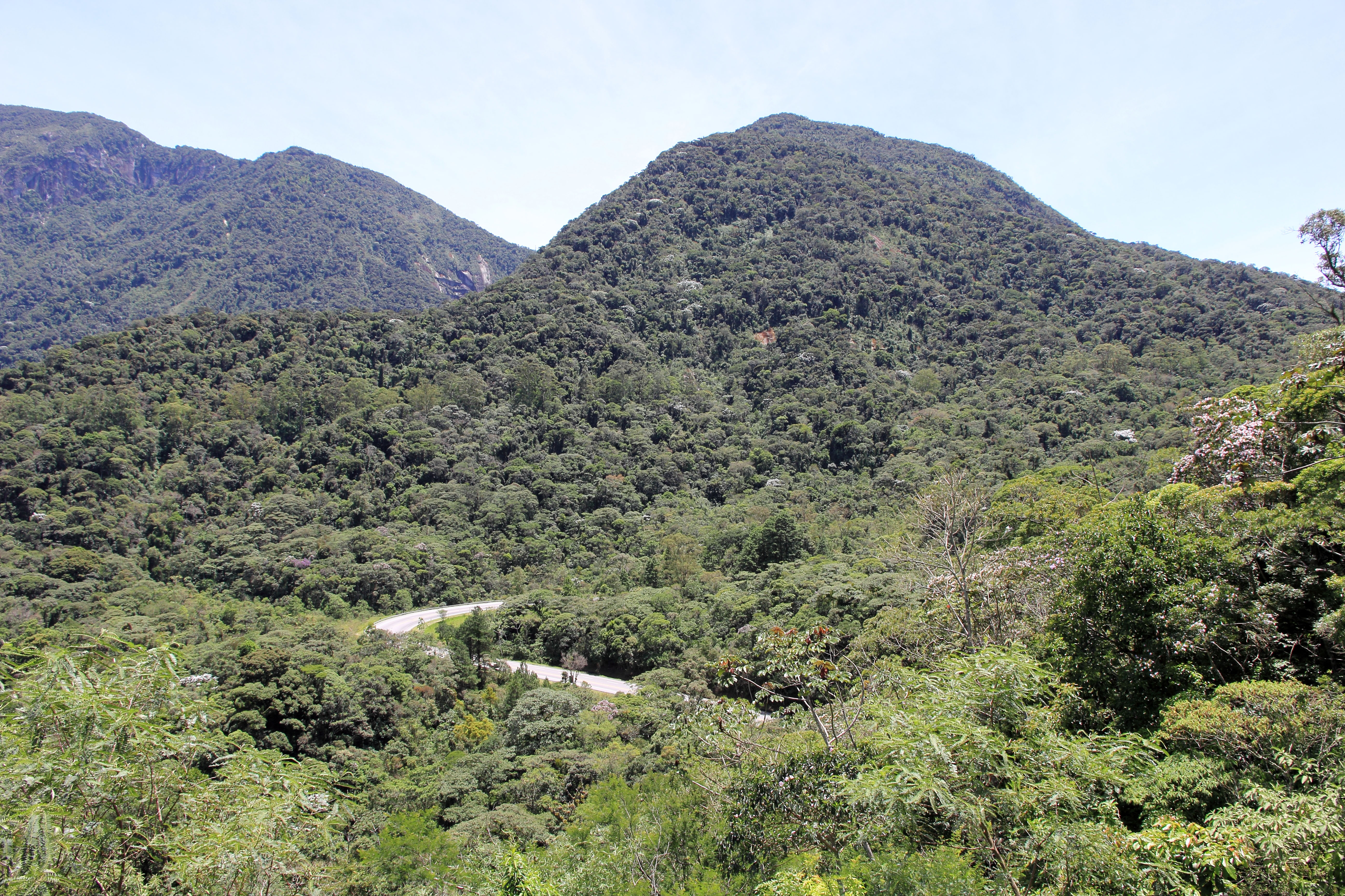 Rodovia Presidente João Goulart - RJ-116 - Trecho entre Cachoeiras de Macacu e Nova Friburgo.